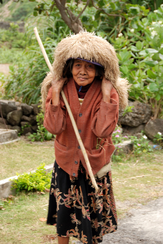 An Ivatan woman